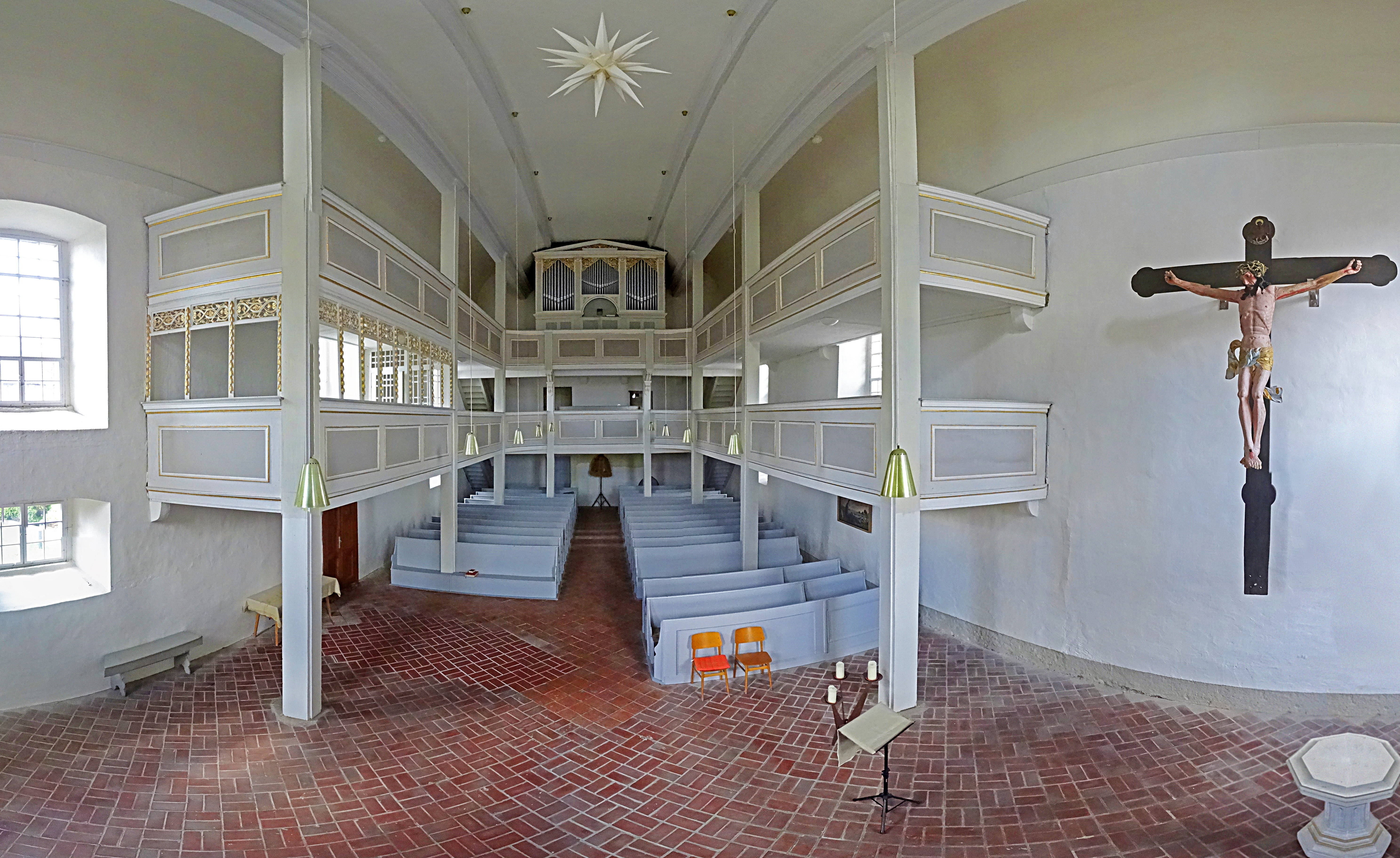 Blick ins Kirchenschiff der Dorfkirche St. Petri (Kutzleben)